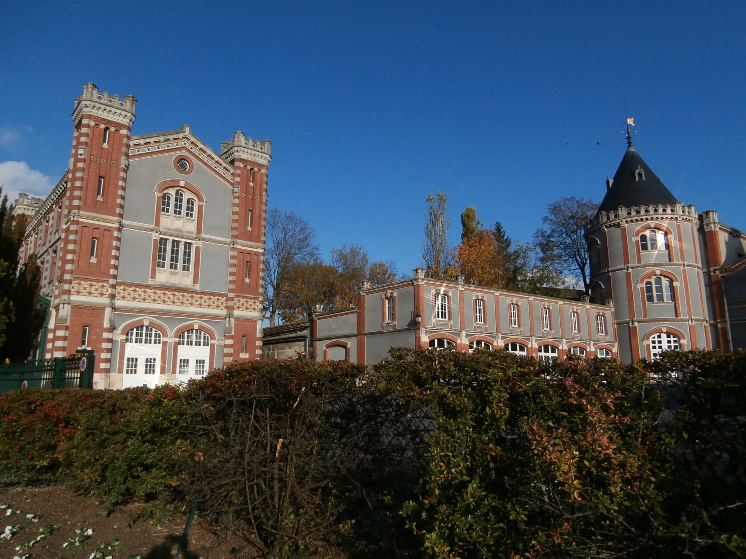 Domaine Pommery : Château de style élizabéthain Reims, 5 place du Général Gouraud Années de construction : de 1868 à 1878 Initiatrice du projet : Jeanne-Alexandrine Louise Pommery